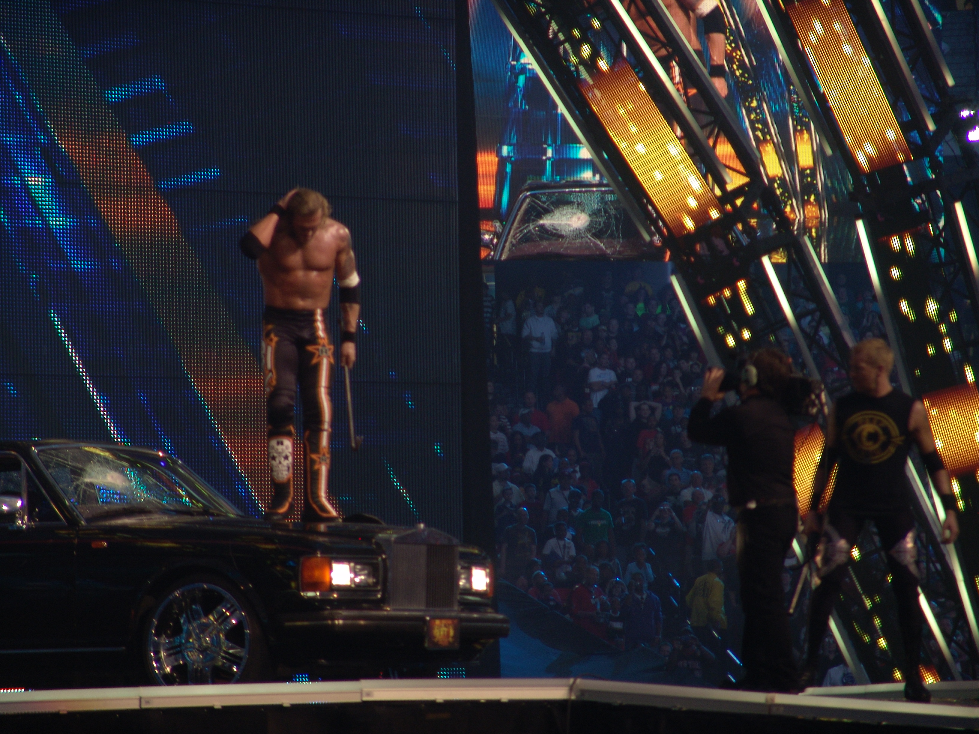 edge y christian destrozando el coche de Del Rio